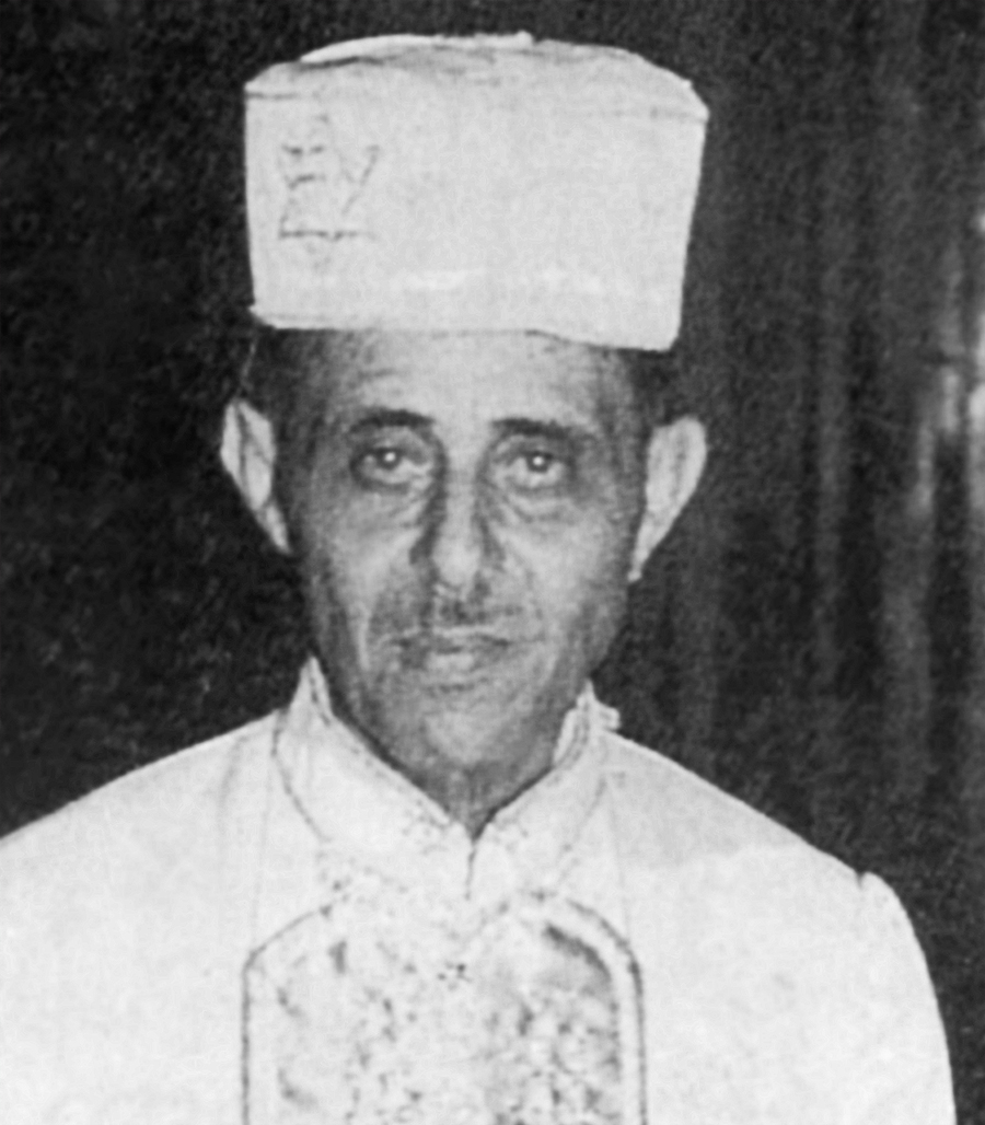 המשורר והמלחין אשר מזרחי